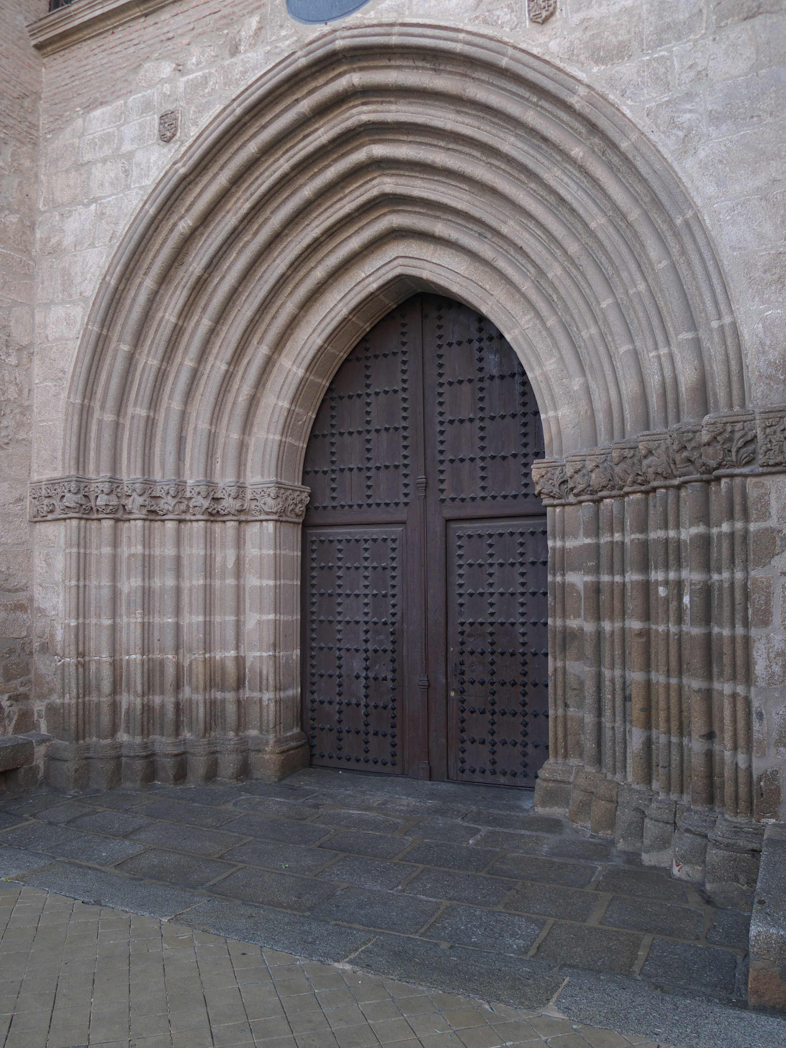 Portada de los pies (s. XIV)